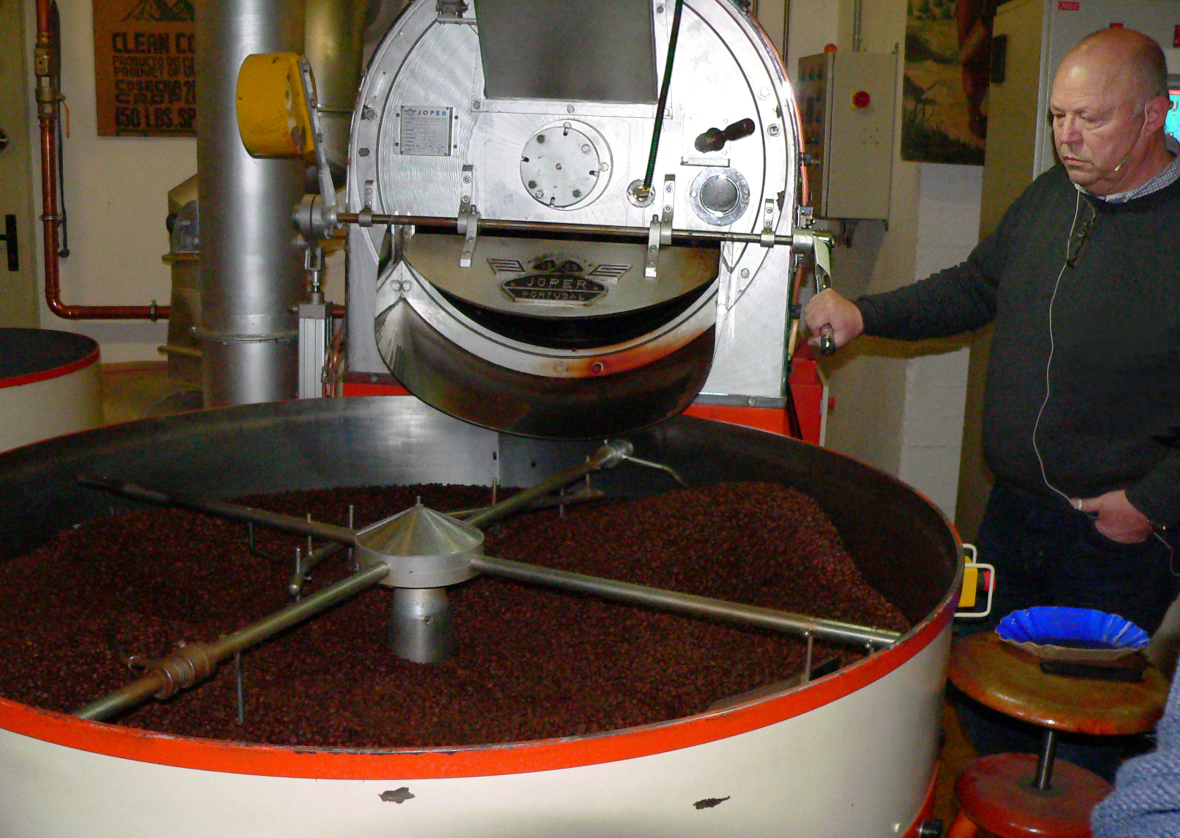 Lloyd Kaffeerösterei im früheren Kaffee-HAG-Werk I im Holz- und Fabrikenhafen in Bremen-Walle, Ortsteil Überseestadt. Hier: Der Röstmeister an der Rösttrommel, bei der Abkühlung der gerösteteten Kaffeebohnen in der offenen Kühltrommel.